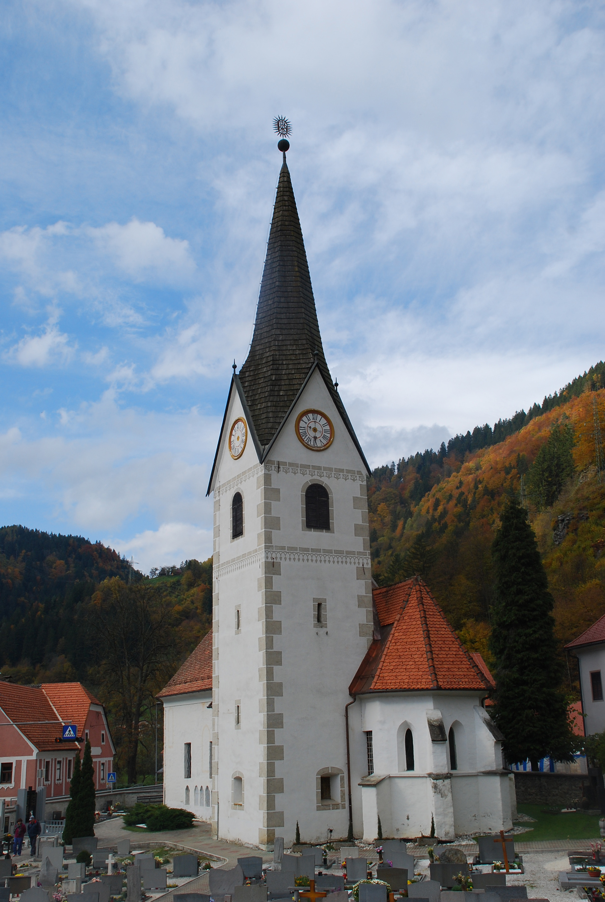 Kirche St. Maria in Brezno (Fresen), Slowenien